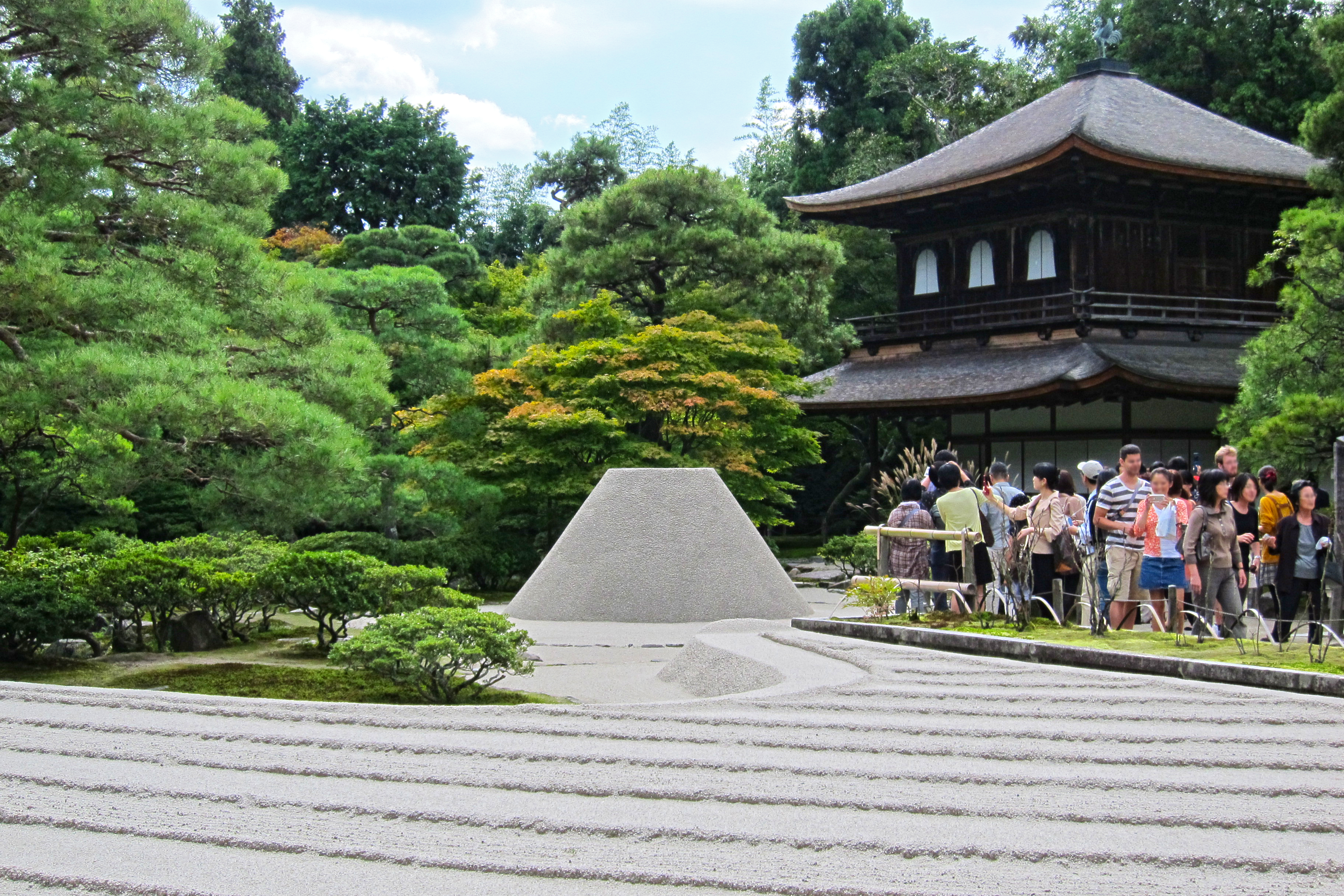 Ginkakuji (銀閣寺), Kyoto, Kyoto prefecture, Japan